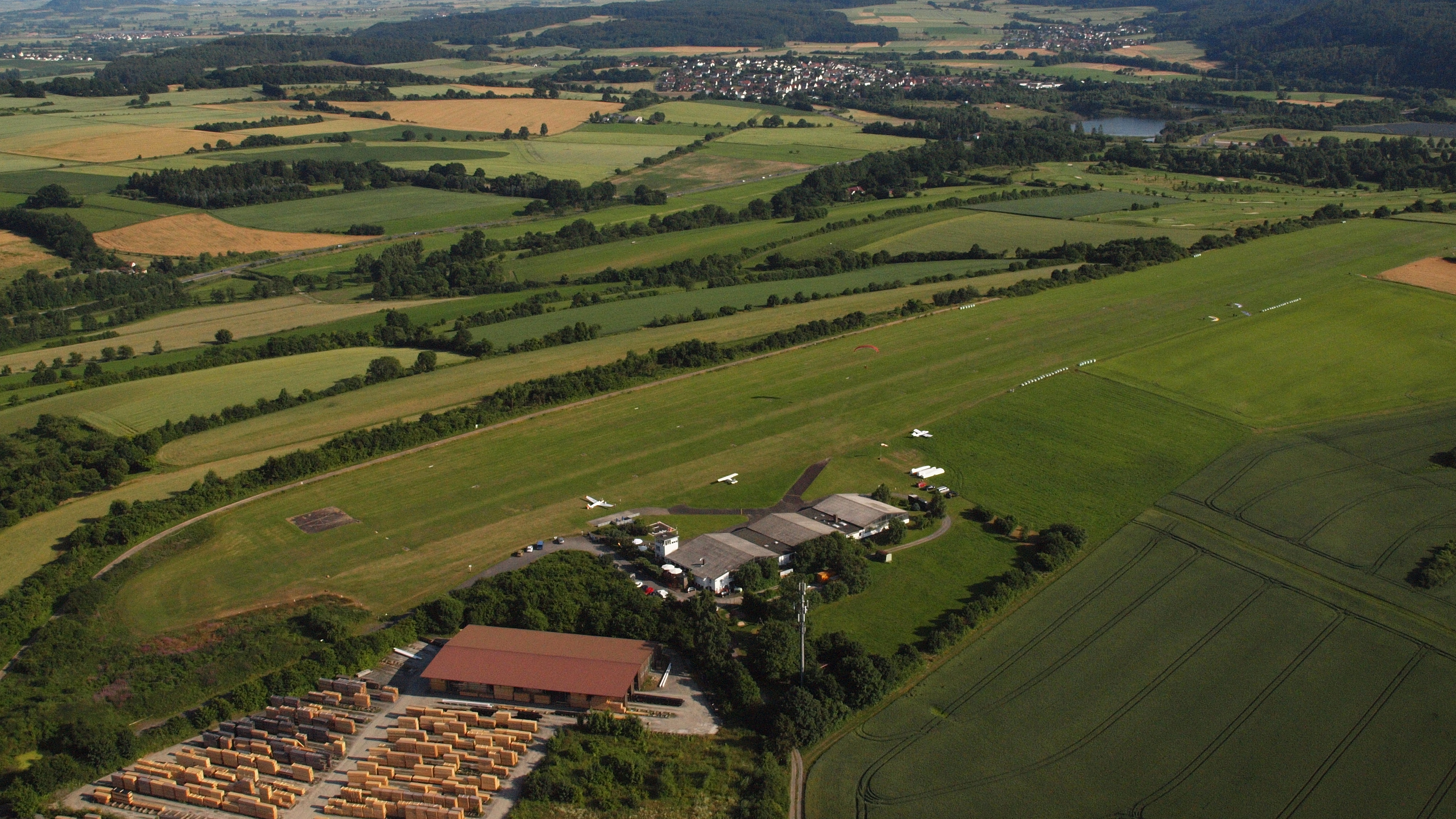 Flugplatz Marburg-Schönstadt: Luftaufnahme aus nördlicher Richtung. Weiter südlich die Landschaft im Ohmtal mit dem Dorf Bürgeln und den renaturierten Kiesgruben in der Aue, jenseits der Ohm der Marburger Stadtteil Ginseldorf.